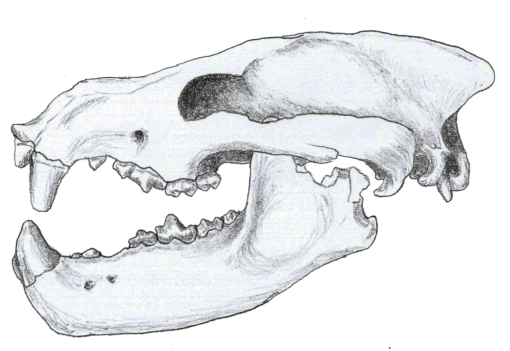 Ysengrinia skull